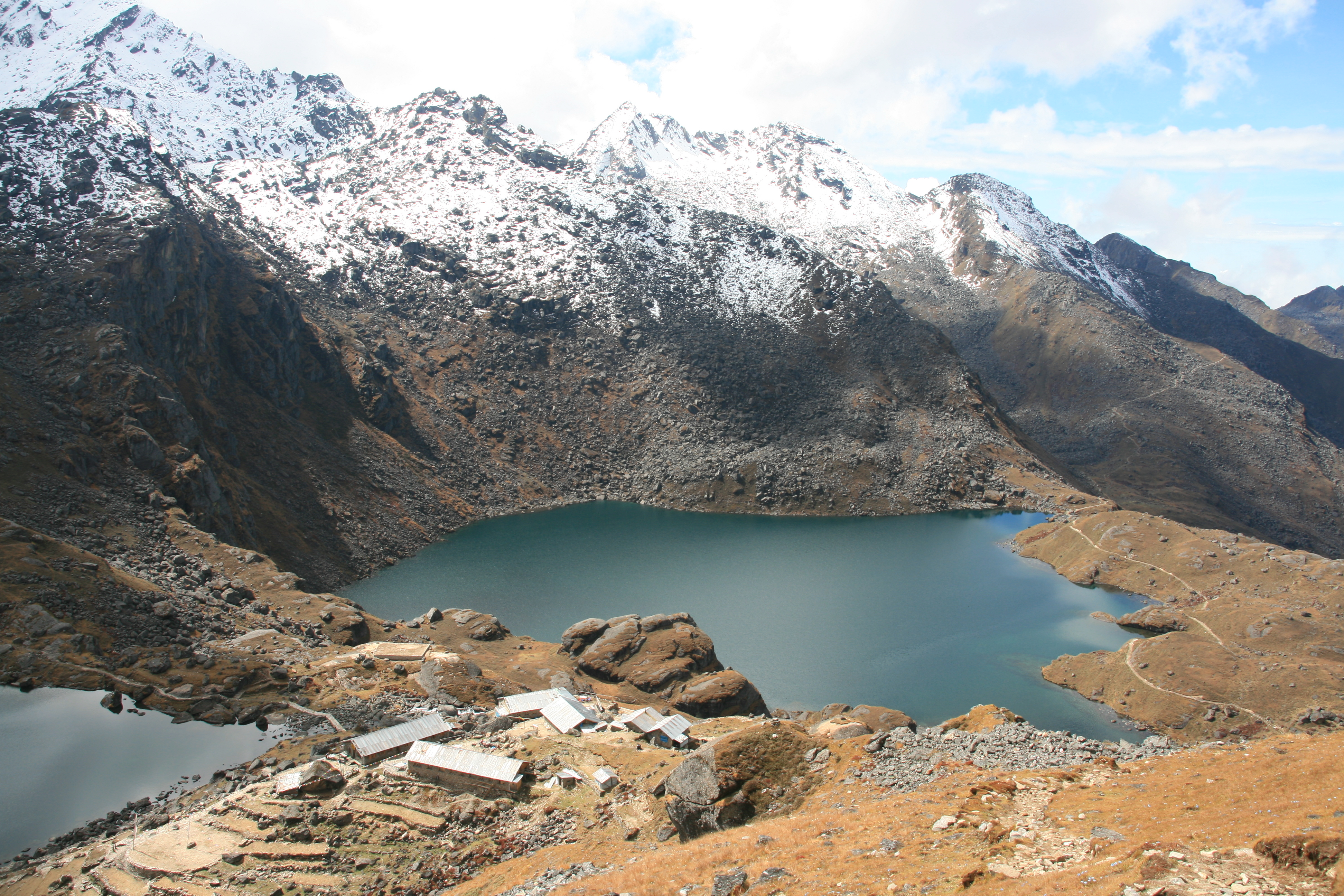 Lake beside Gosainkunda_Lake, Langtang, Nepal